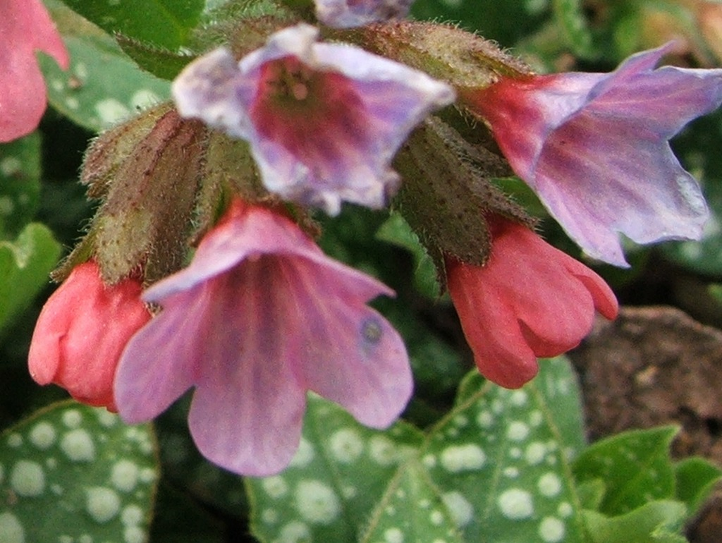 Name:Pulmonaria officinalis (pl. miodunka lekarska)